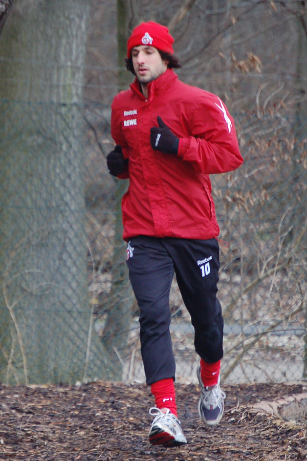 Köln: Thomas Broich beim Lauftraining der Profi-Mannschaft des 1. FC Köln nahe dem Müngersdorfer Stadion, Köln.